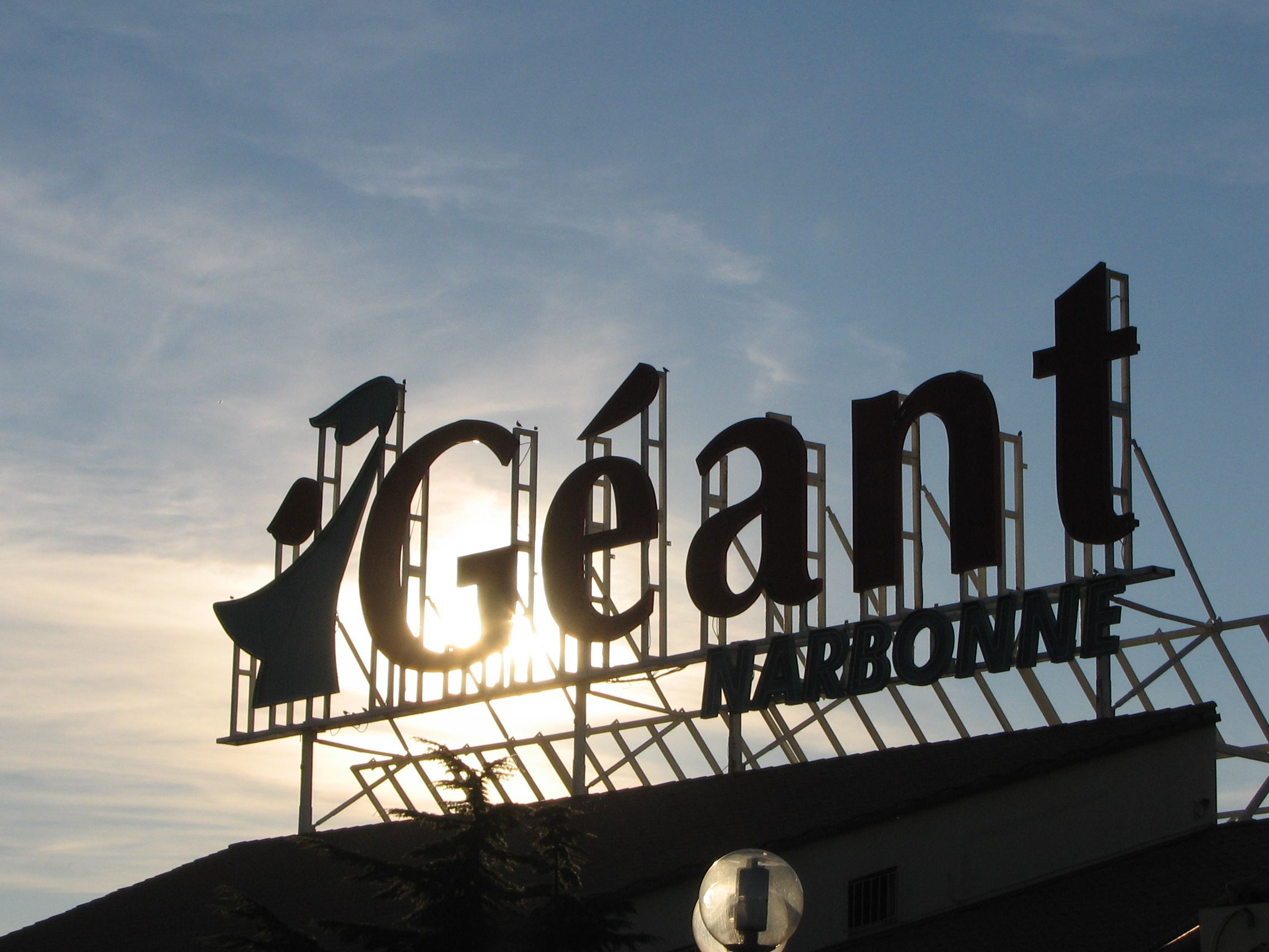 Enseigne du Supermarché Géant de Narbonne (Aude, France).